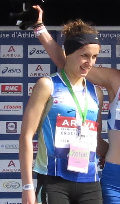 Championnats de France de Cross Country organisé à Lignières dans le cher à l'hippodrome.Podium Juniors filles 1) Johanna Geyer Carles (au centre) Athlé Sud 77 2) Leonie Periault (à gauche) 3) Emma Sextius (à droite)